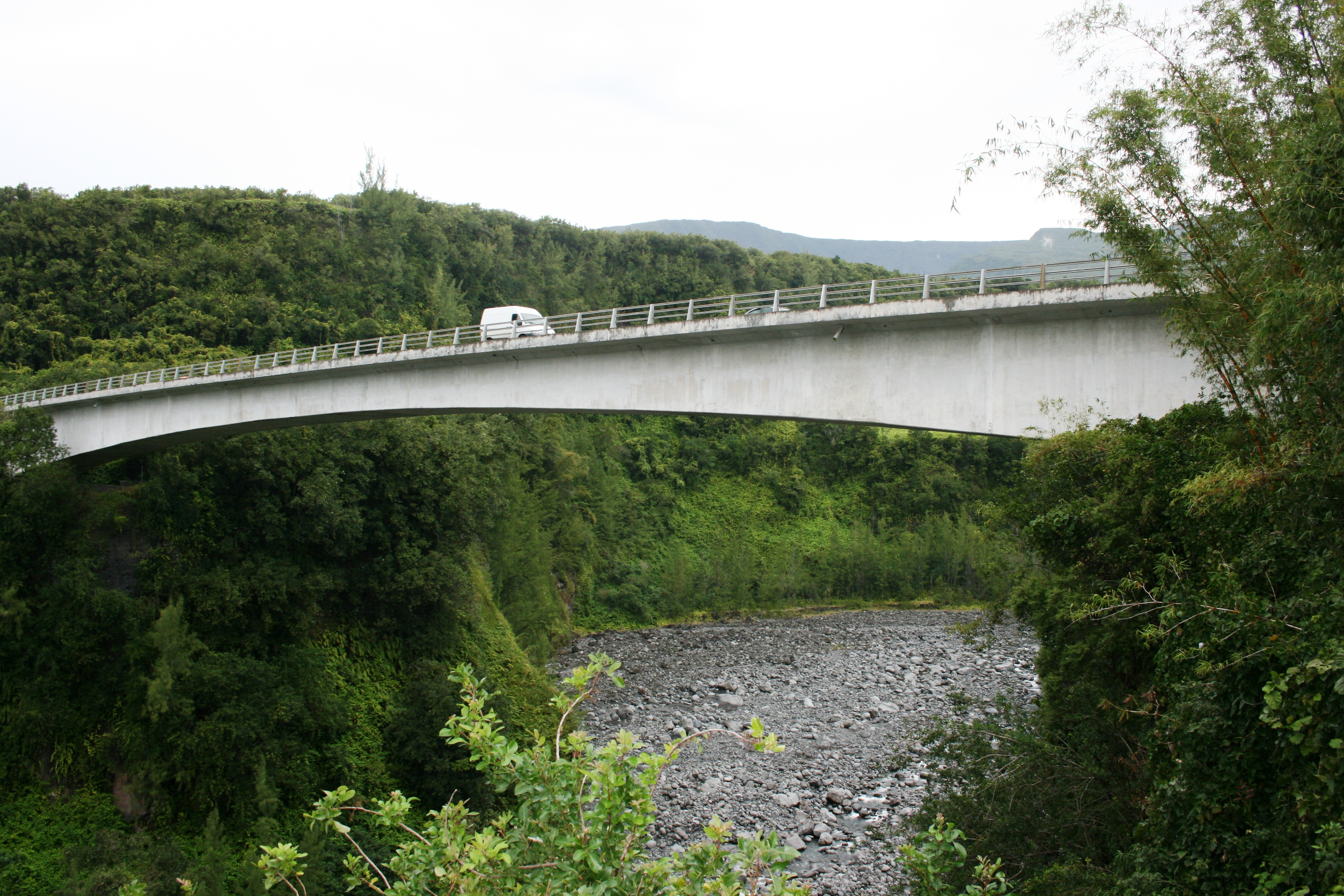 Le nouveau pont de la rivière de l'Est, sur l'île de la Réunion